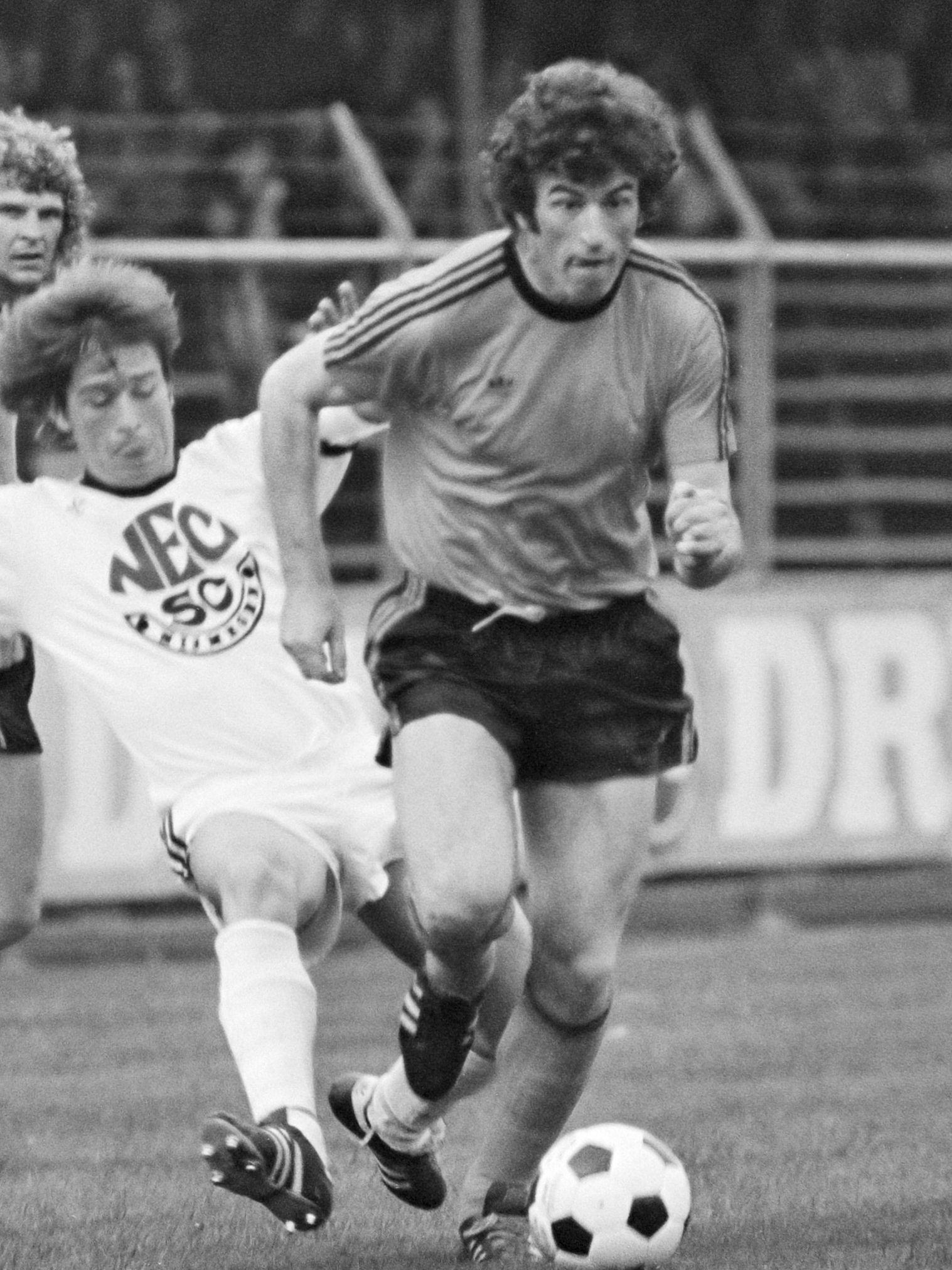 Volendam tegen NEC, Frank Kramer in actie 6 september 1978